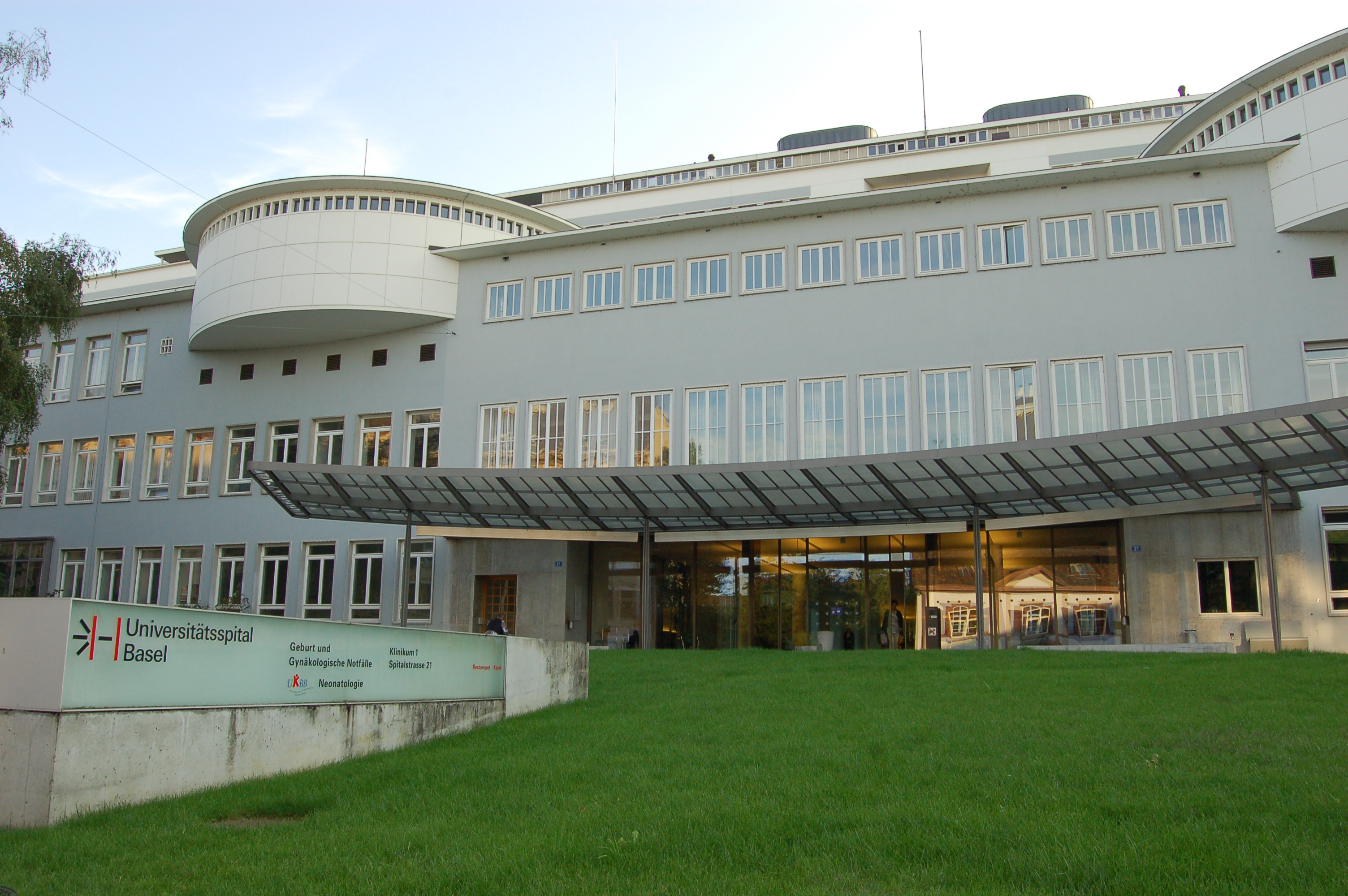 Universitätsspital Basel